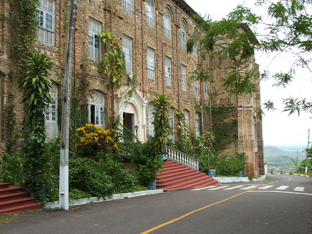 Mosteiro dos Jesuítas. Abaixo podemos ver a Cidade de Baturité. Antes uma escola religiosa.